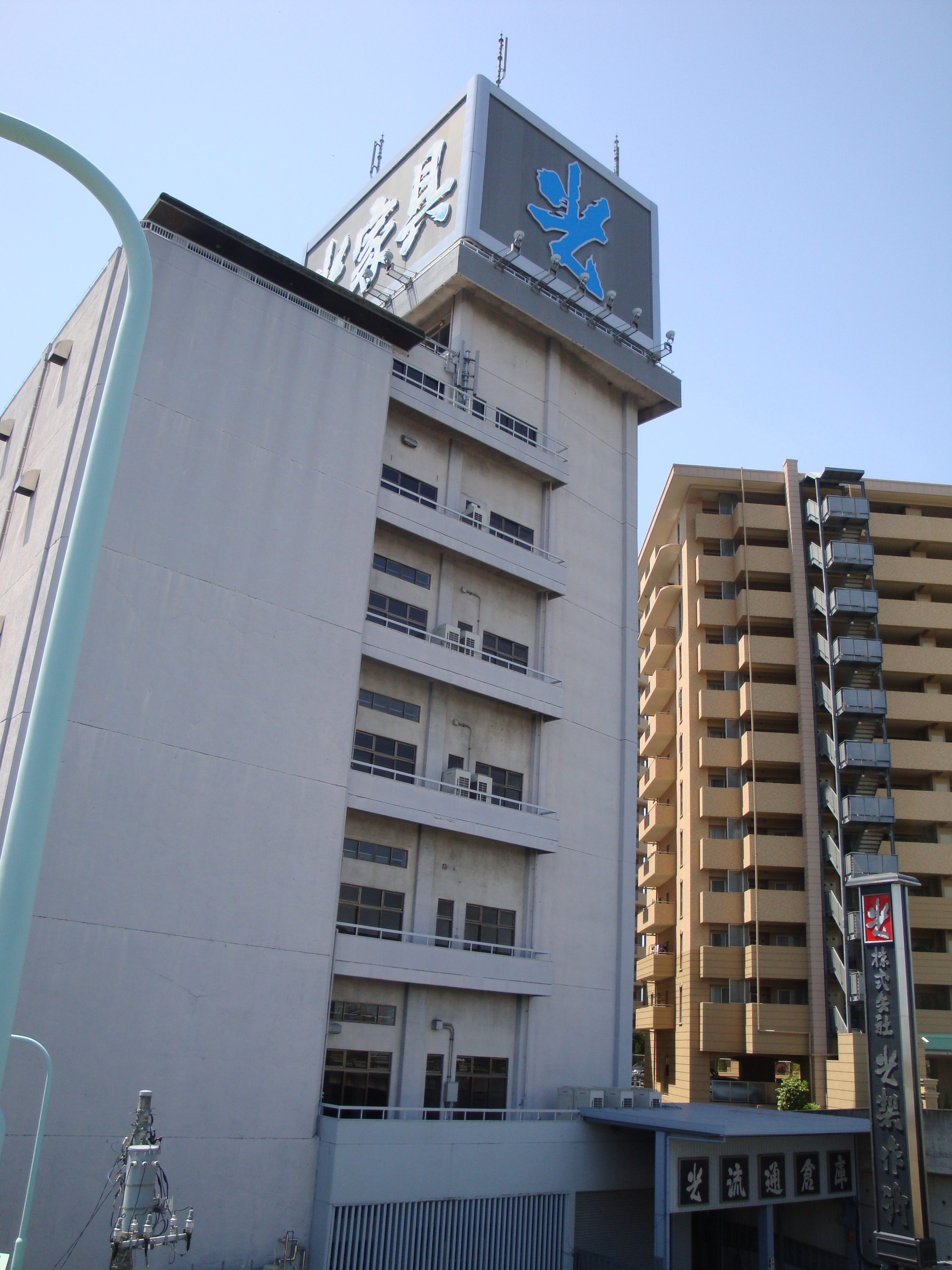 東京都足立区小台にある光製作所「光流通倉庫」